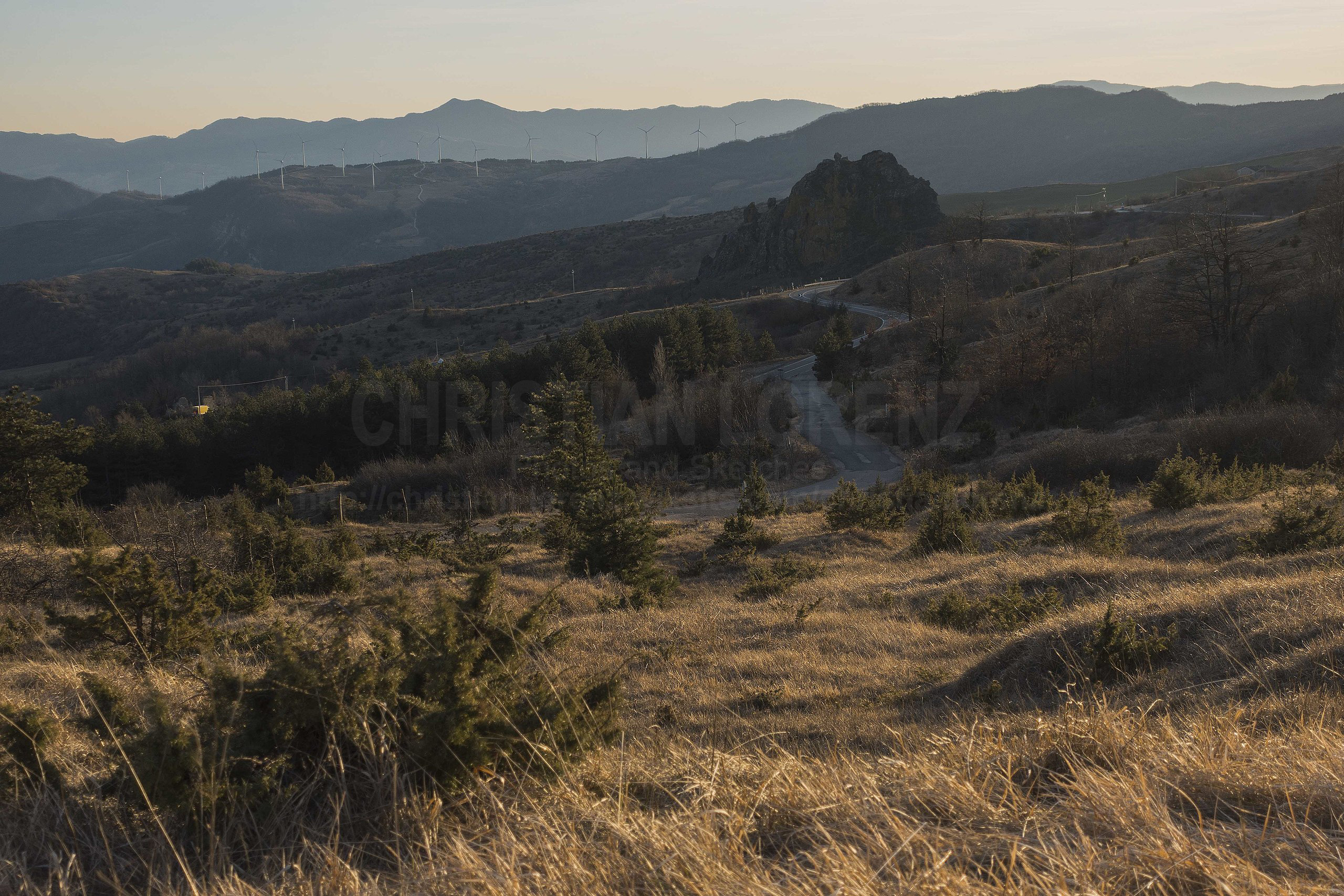 Il Sasso di San Zanobi osservato dal confine Toscana-Romagna. Alle sue spalle il parco eolico di Carpinaccio.